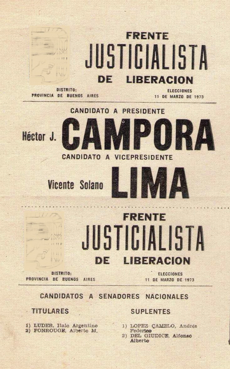 Boleta electoral del FreJuLI con la fórmula de Cámpora-Lima en 1973. Distrito Provincia de Buenos Aires.